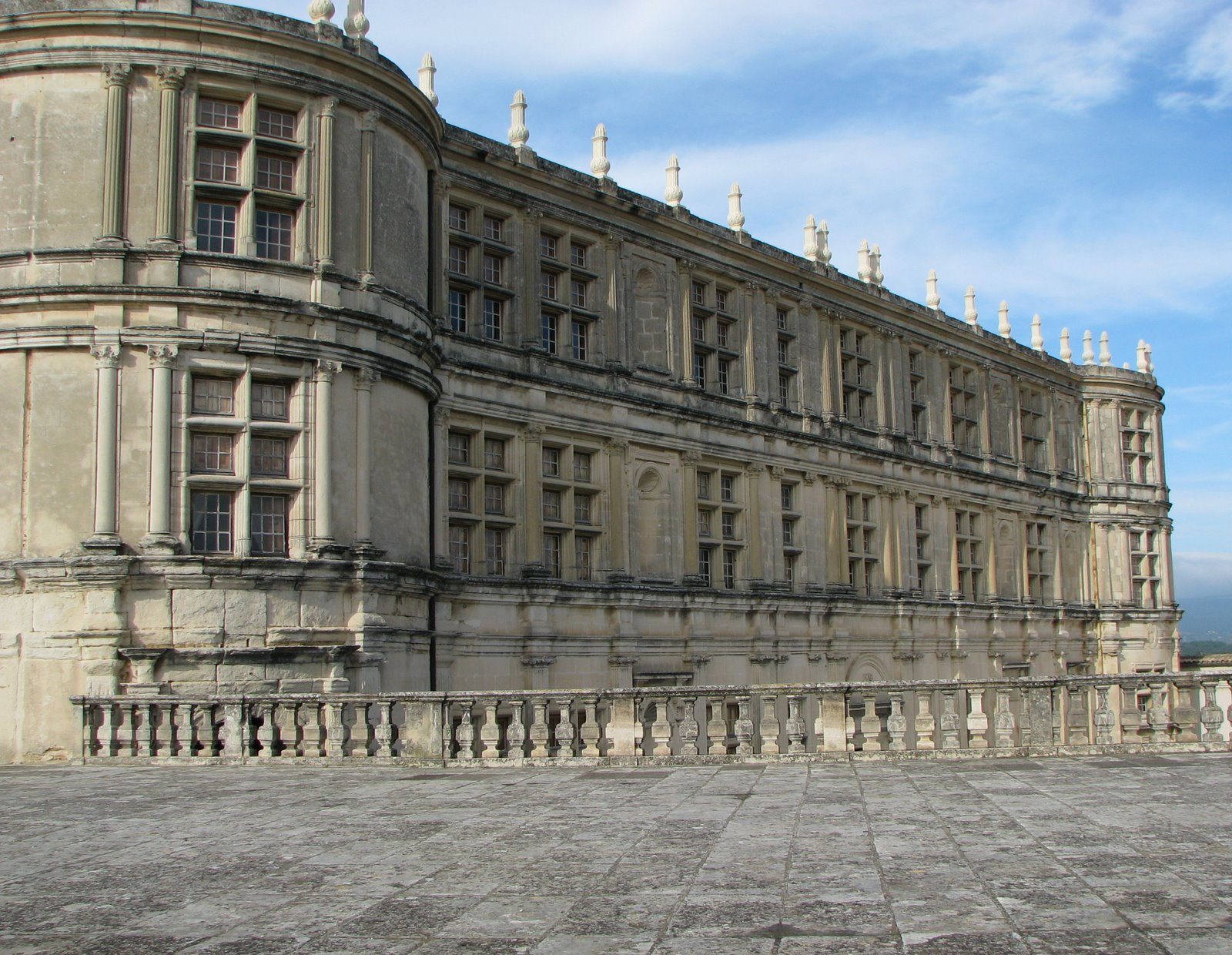 Schloss Grignan, Drôme